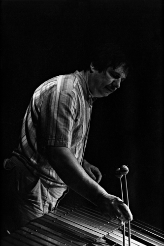 Konzert mit Vibraphon